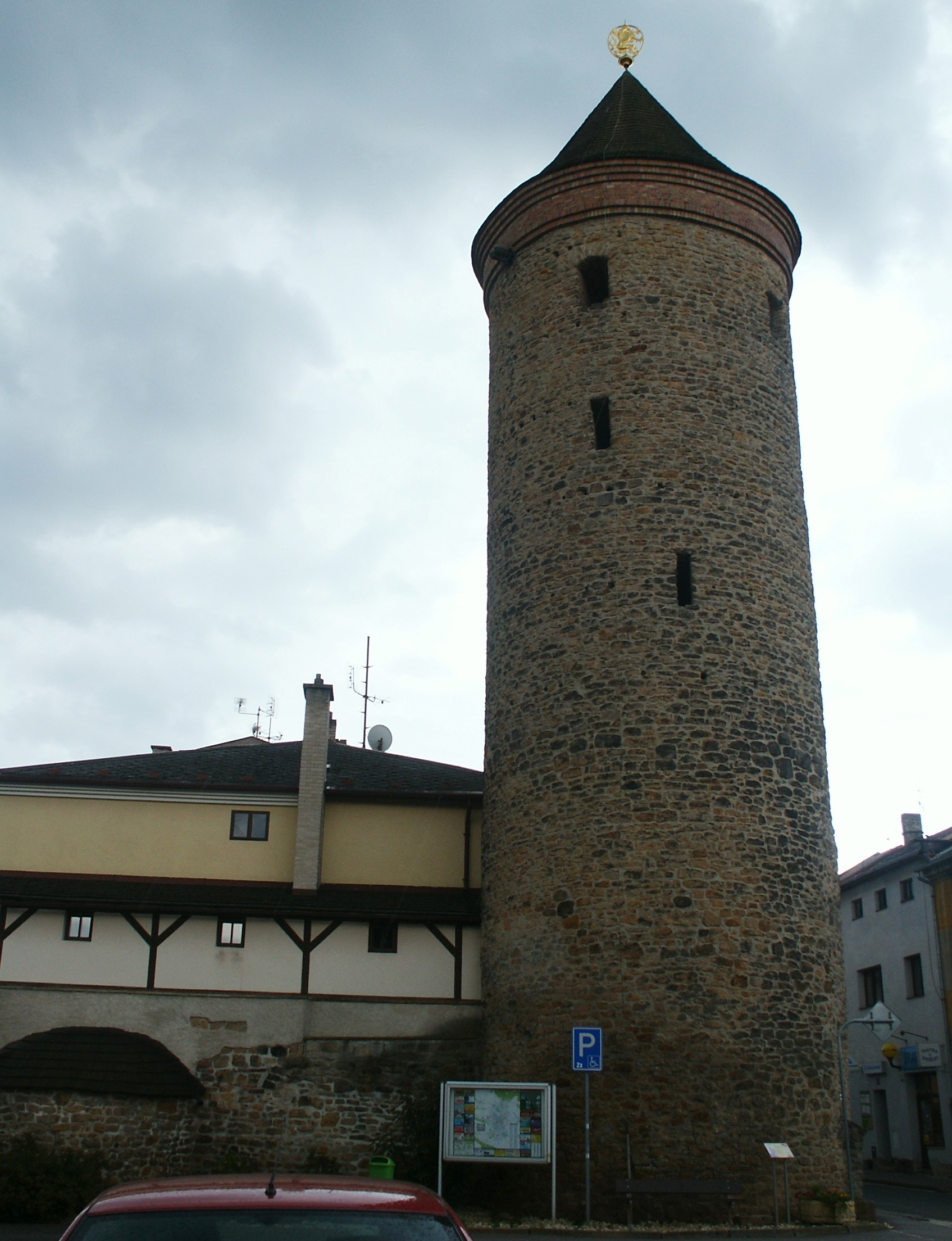 Městské opevnění, Dvůr Králové nad Labem - Šindelářská věž.